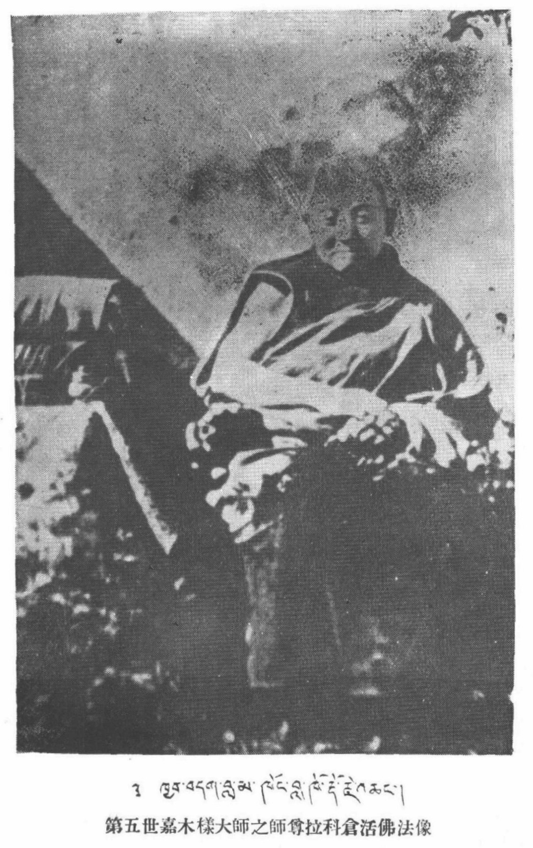 喇果呼圖克圖